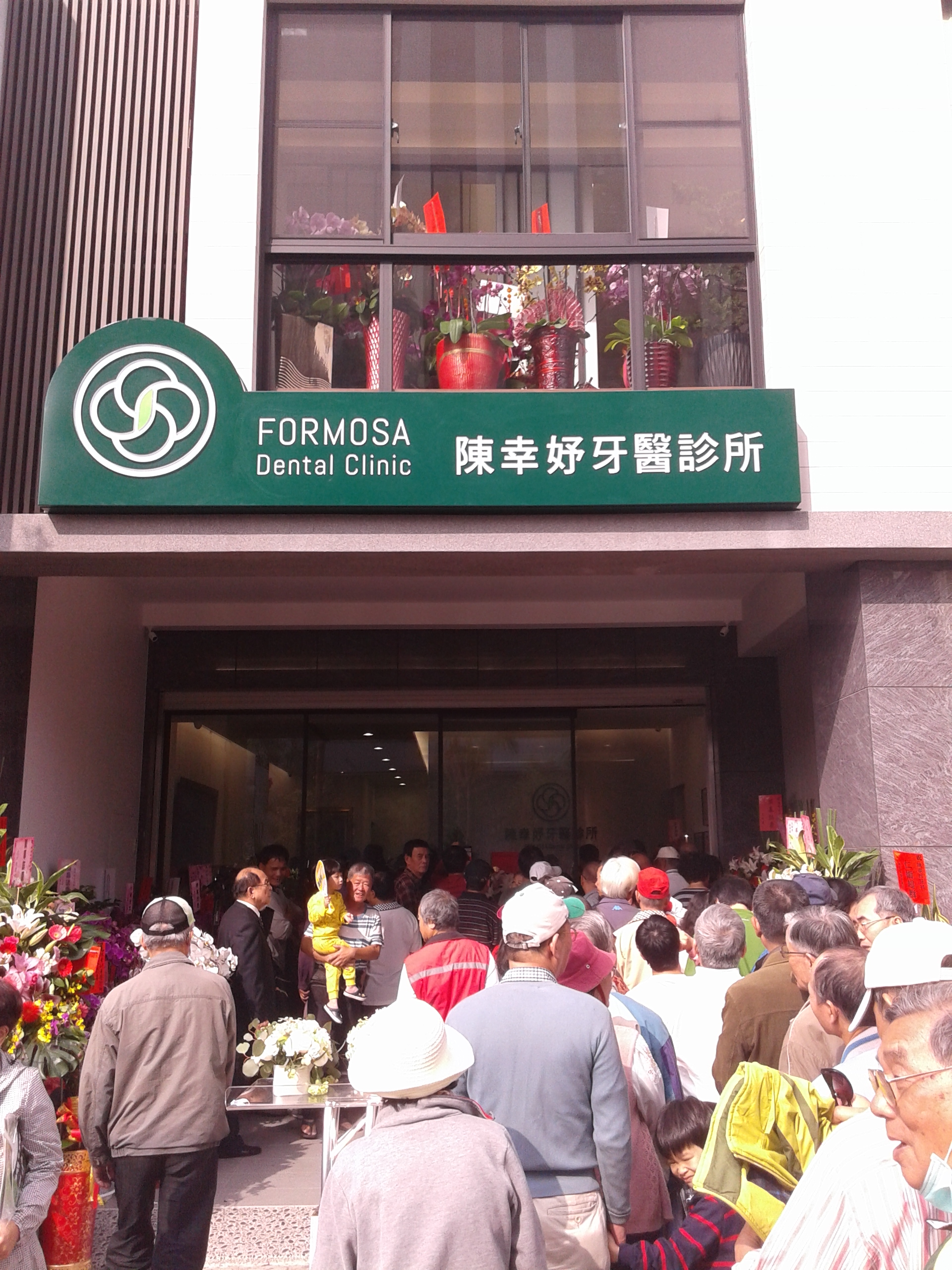 2016年12月24日，陳幸妤牙醫診所在臺南市東區開業。